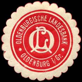 Sealing stamp Title: Oldenburgische Landesbank - Oldenburg i/Gr. Description: rot, weiß, geprägt Place: Oldenburg size: 3 cm